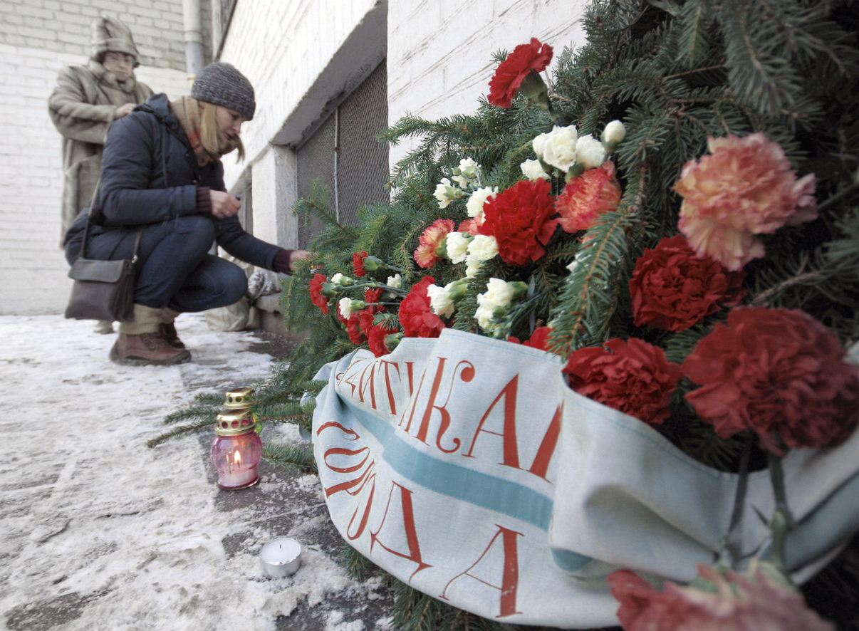 Жители города приносят цветы к Блокадной подстанции в памятные даты: 8 марта, 15 апреля, а также 18 и 27 января.